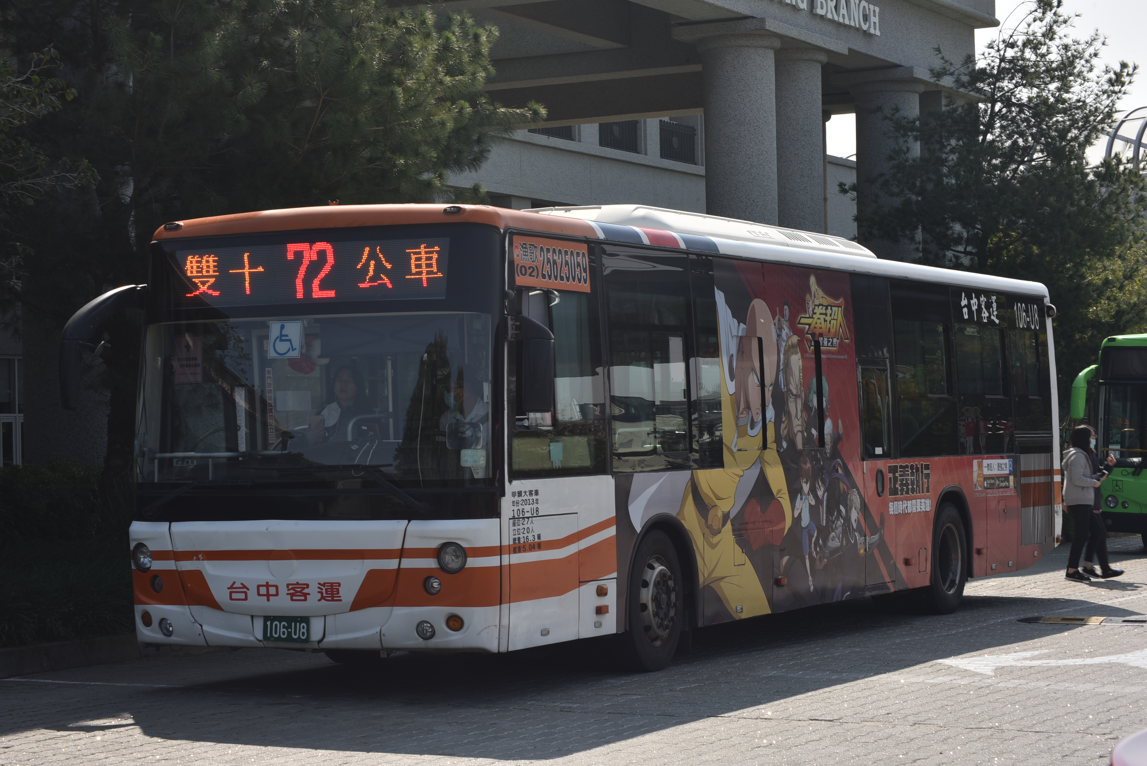 中文（台灣）: 慈濟醫院前的台中客運雙十公車(106-U8)